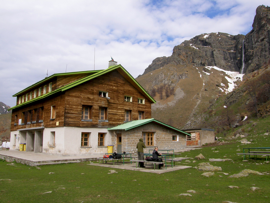 хижа Рай, Стара планина